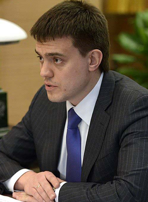 Руководитель ФАНО Михаил Котюков на встречи с Владимиром Путиным